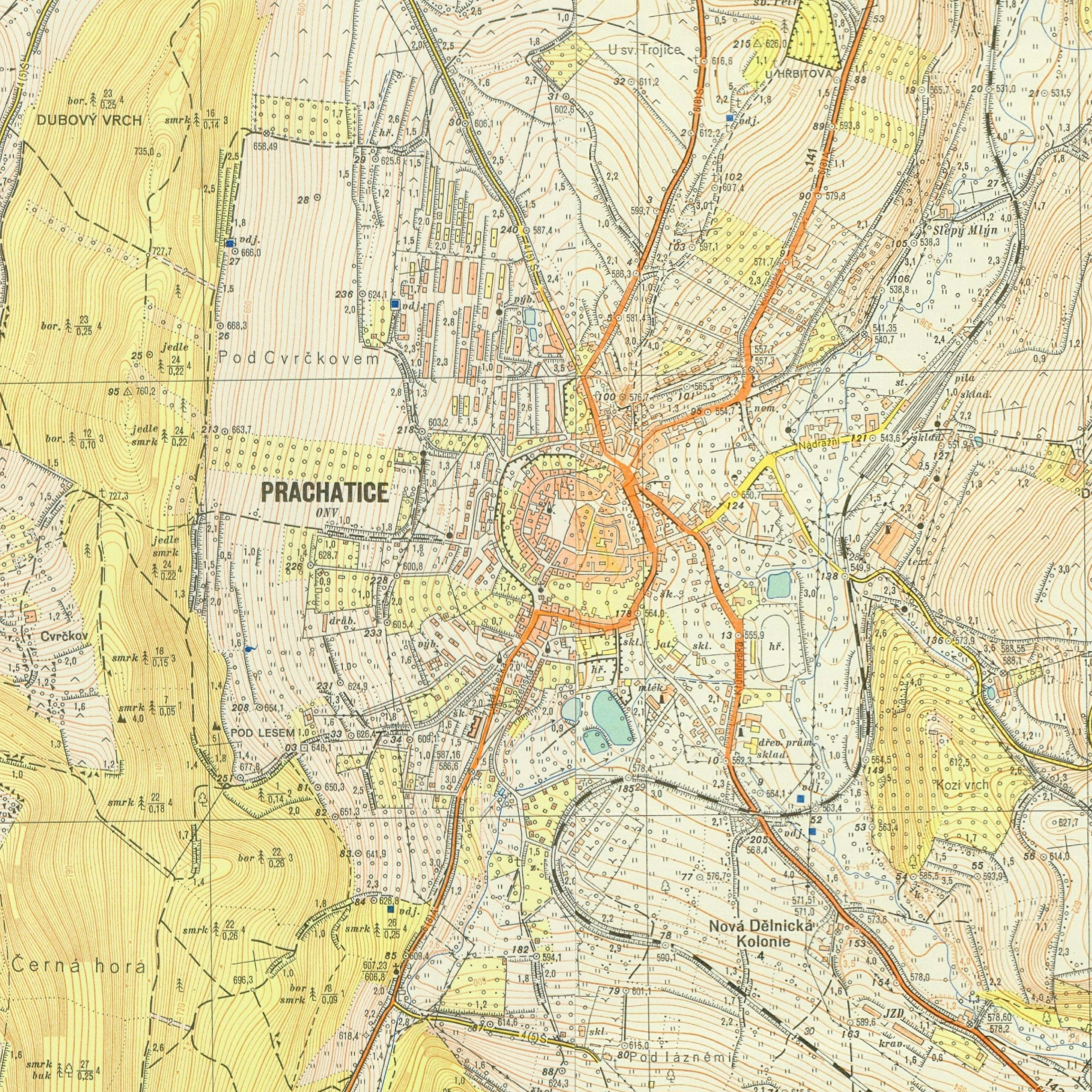 Prachatice na topografické mapě 1:10 000 z roku 1961. Výřez z mapových listů: M-33-101-C-c-3 (Mapoval v r. 1959 V. Kouba, kreslily J. Hedánková, N. Řežábková, tištěno v. r. 1961) M-33-100-D-d-4 (Mapoval v r. 1958 ing. J. Pysk, kreslily J. Hedánková, V. Lukášová, tištěno v. r. 1961)